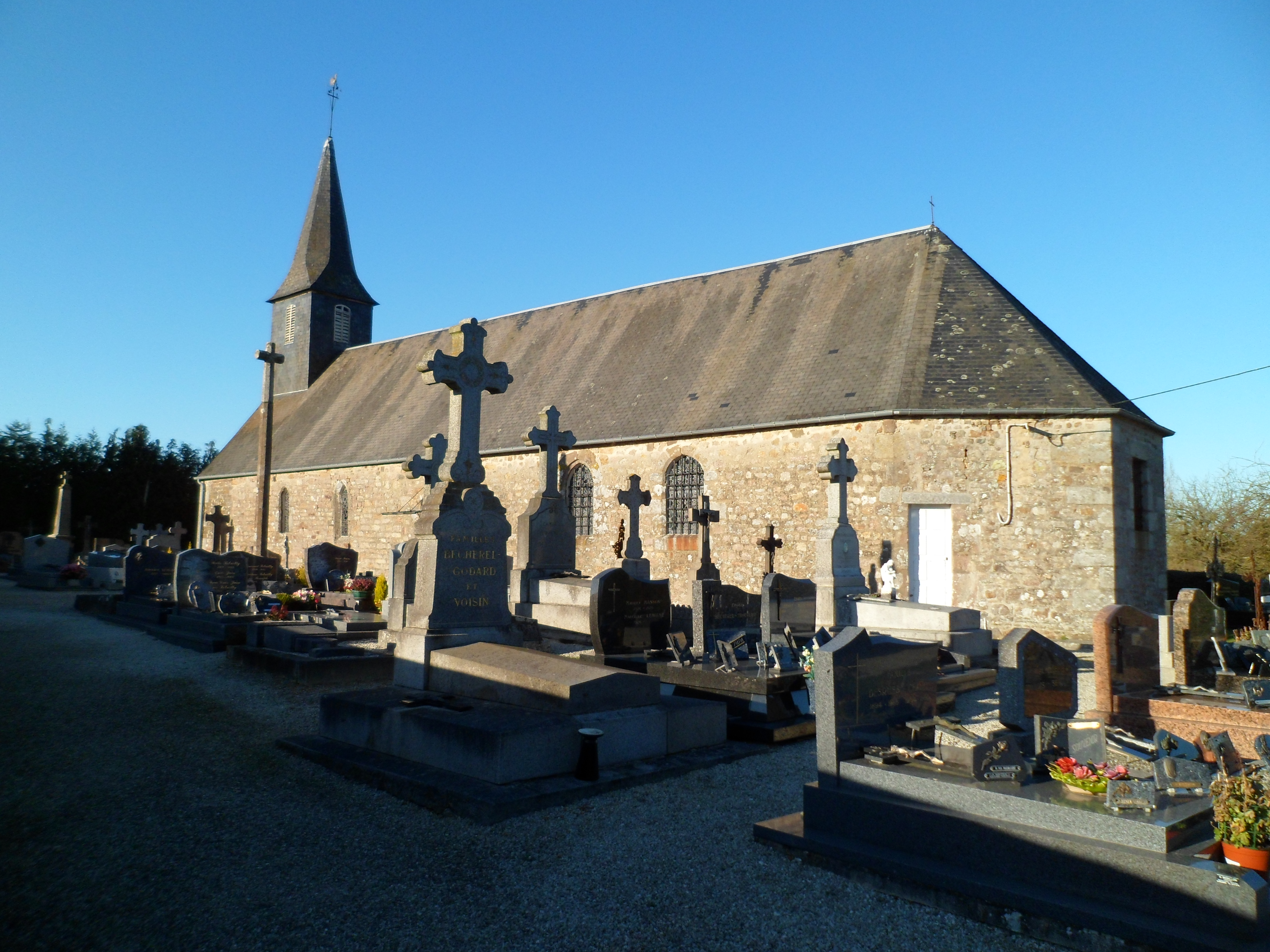 Église Notre-Dame-et-Saint-Gorgon de Margueray